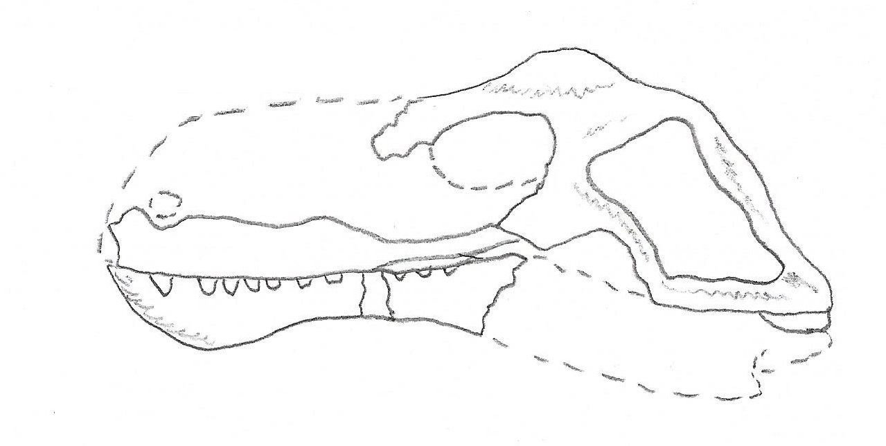 Dimacrodon